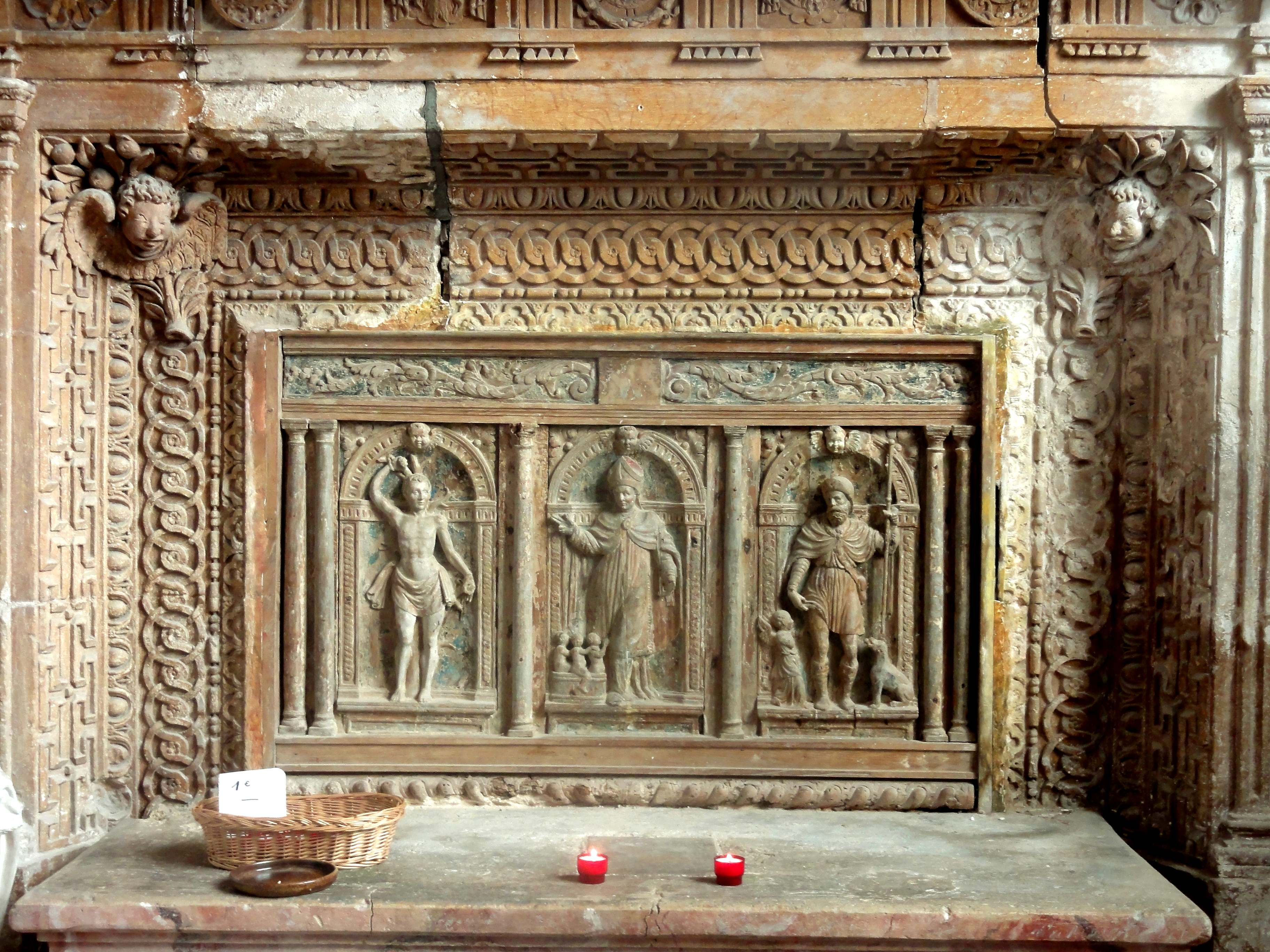 Retable de la chapelle de la Vierge.